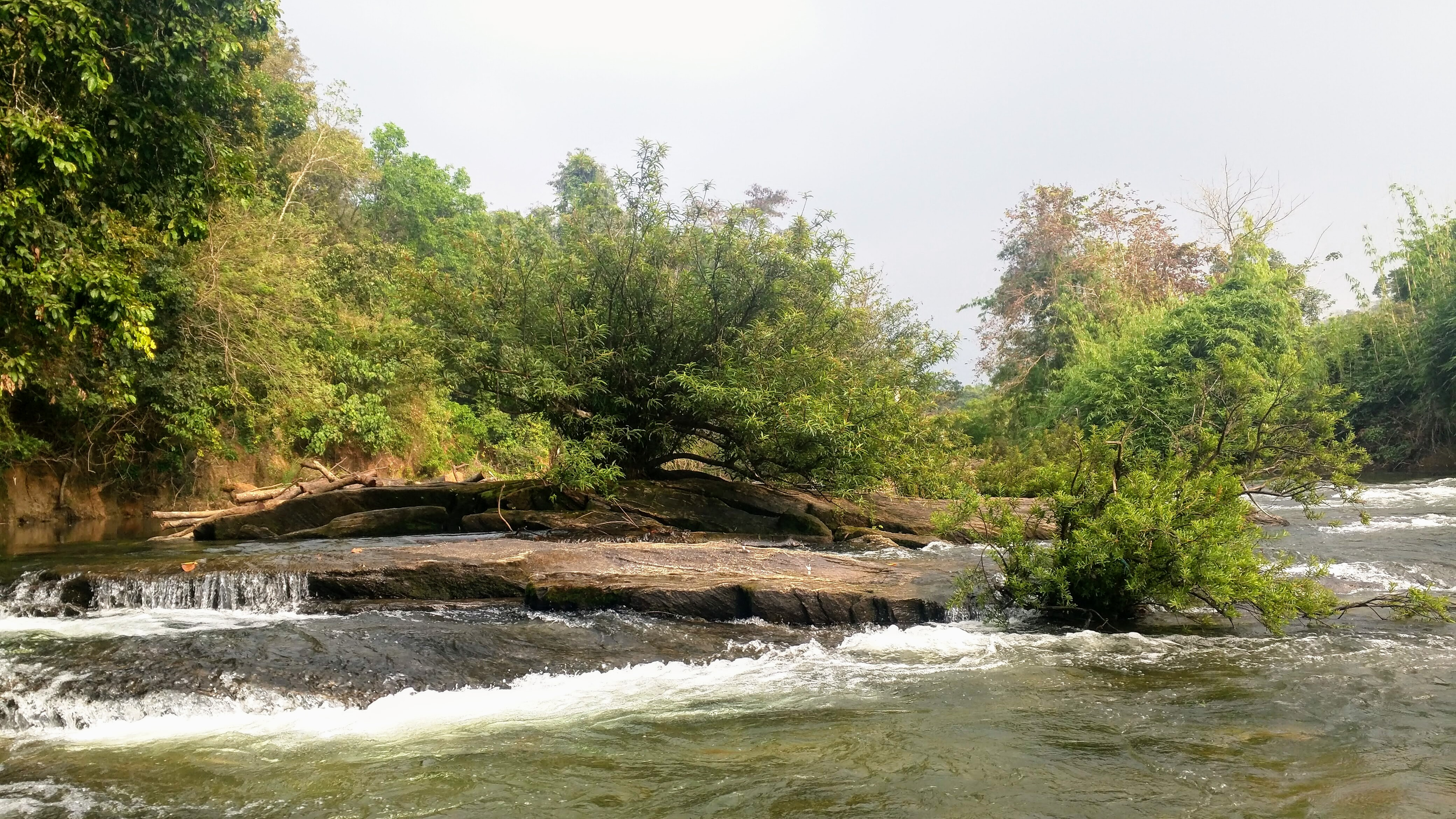 ജാനകിക്കാടിനുള്ളിലൂടെ ഒഴുകുന്ന കുറ്റ്യാടിപ്പുഴ